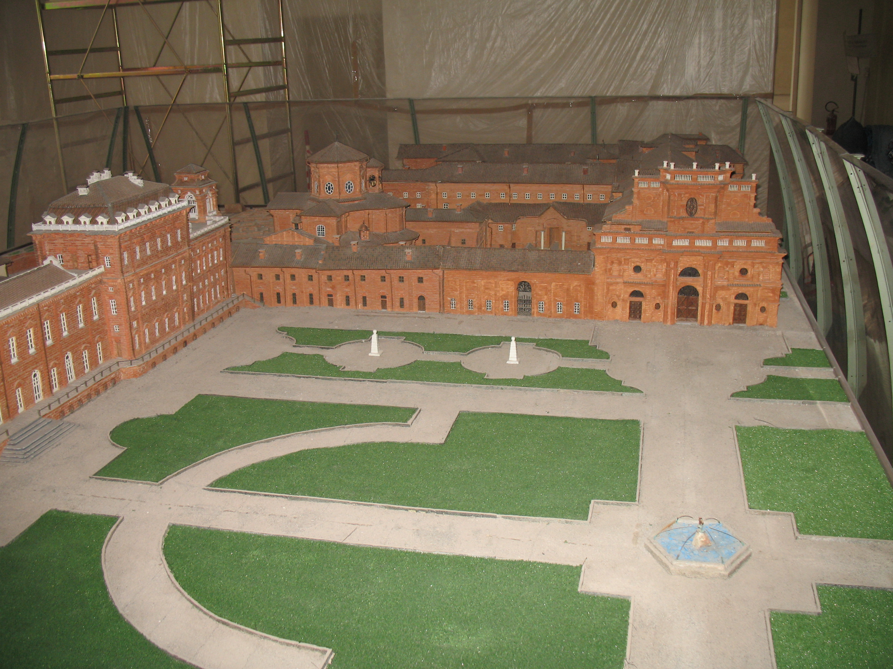 Modellino della reggia di Venaria Reale, Torino